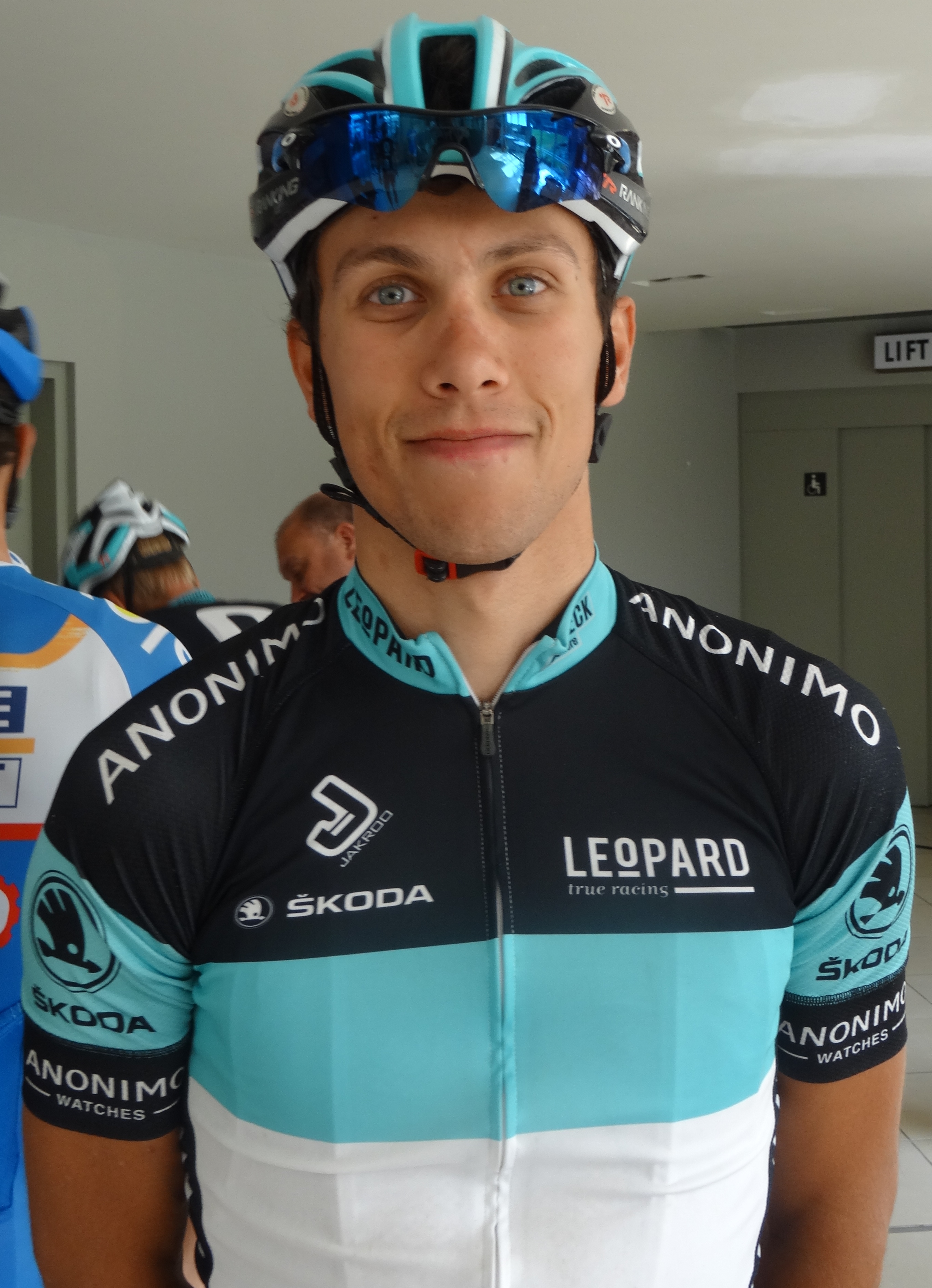 Reportage photographique réalisé le samedi 13 septembre à l'occasion du départ et de l'arrivée de la Flèche côtière 2014 à Heist (Knokke-Heist), Belgique.